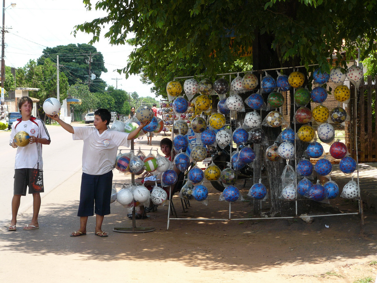 Fotos tomadas por mí, a inicios del año 2008 vendedores de pelotas a la vera del camino en quiindy